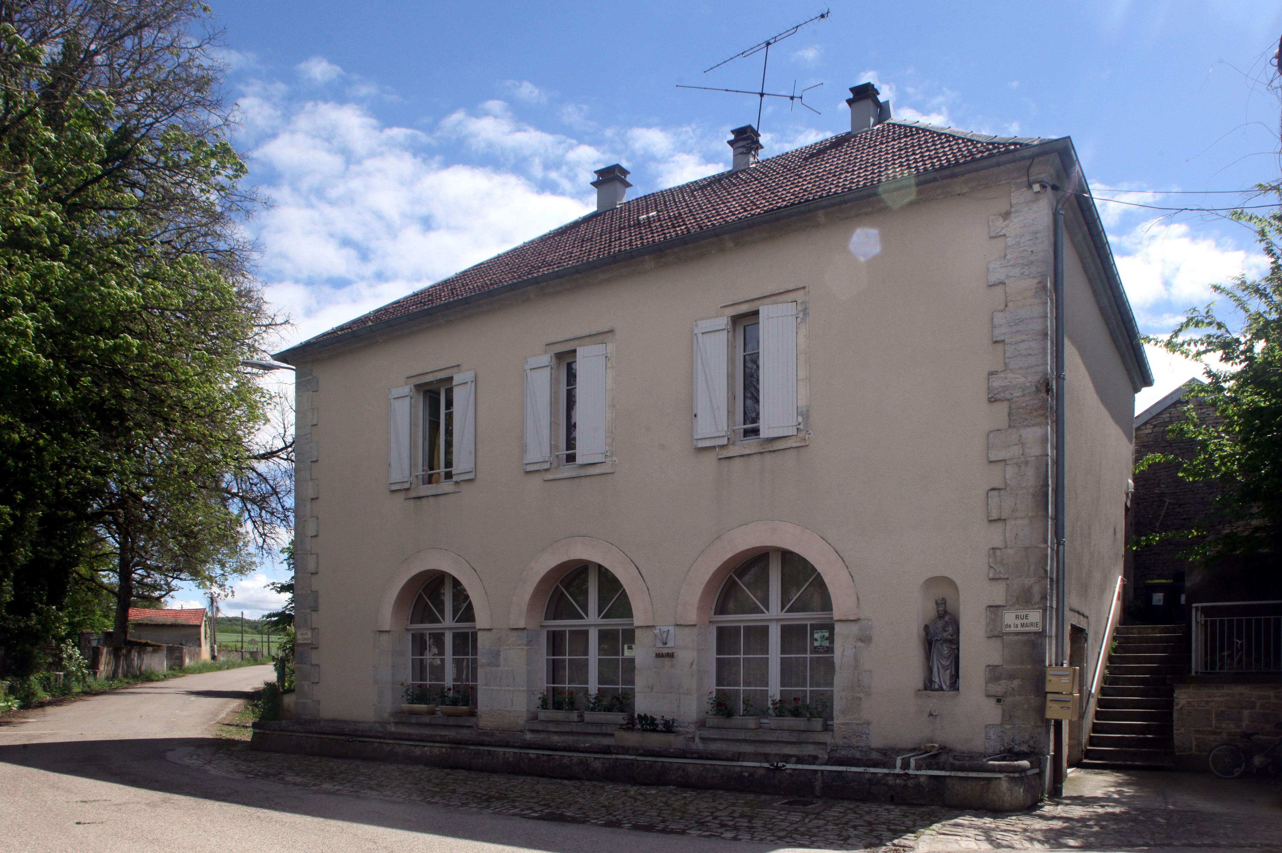 Mairie de Lavans-Quingey.